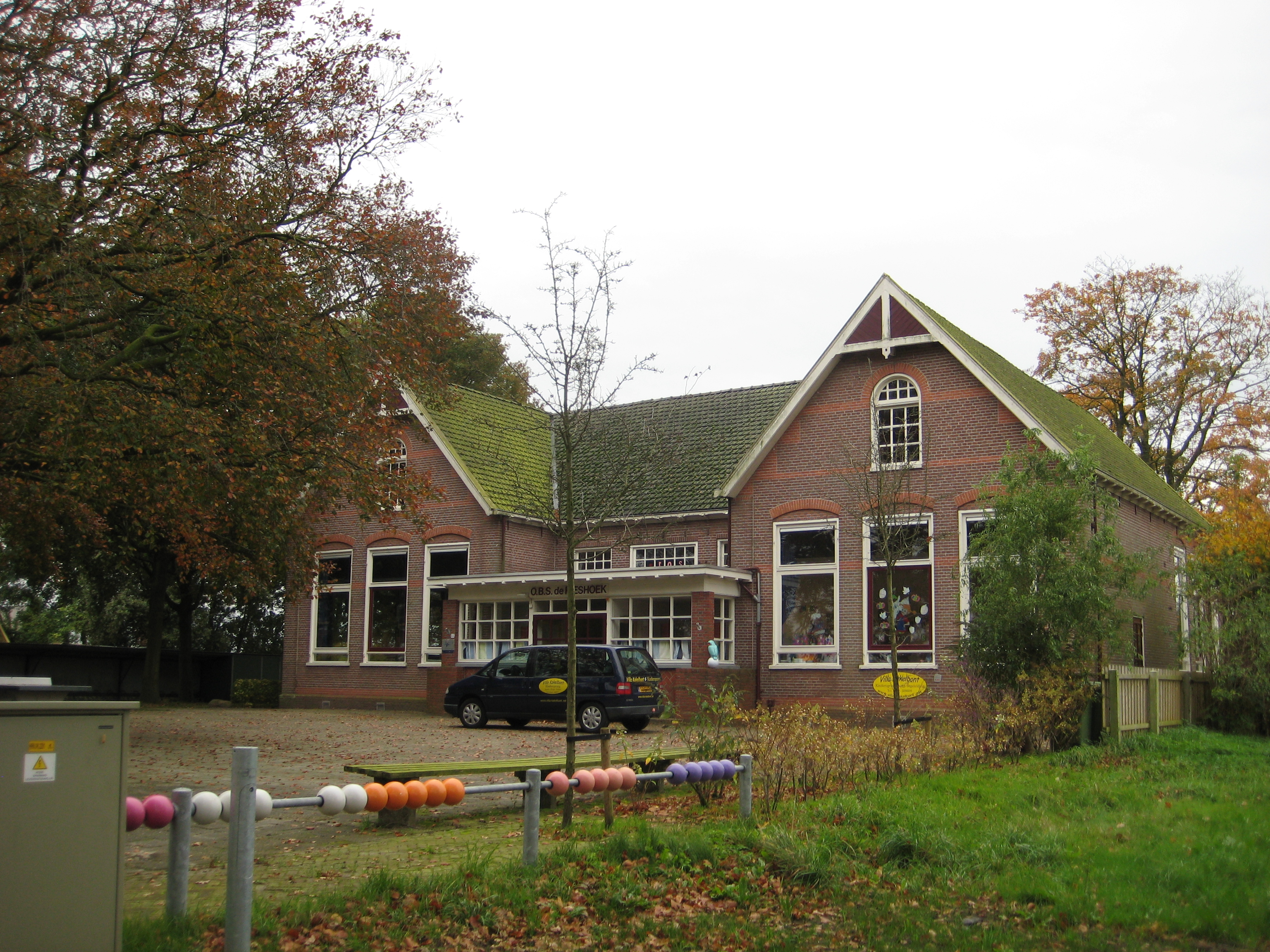 Openbare basisschool De Rieshoek 1910